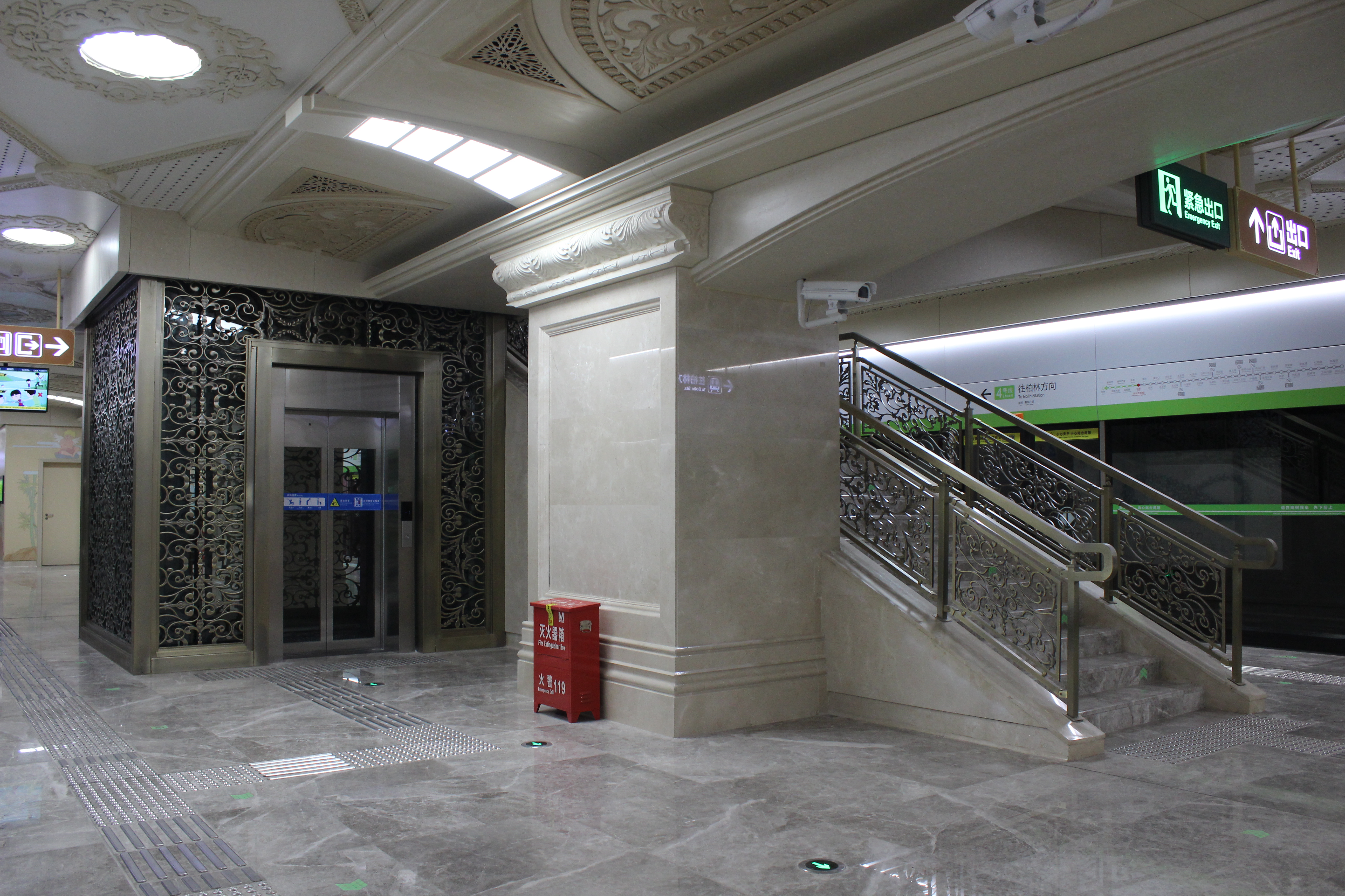 中文（中国大陆）: 武汉轨道交通4号线知音站